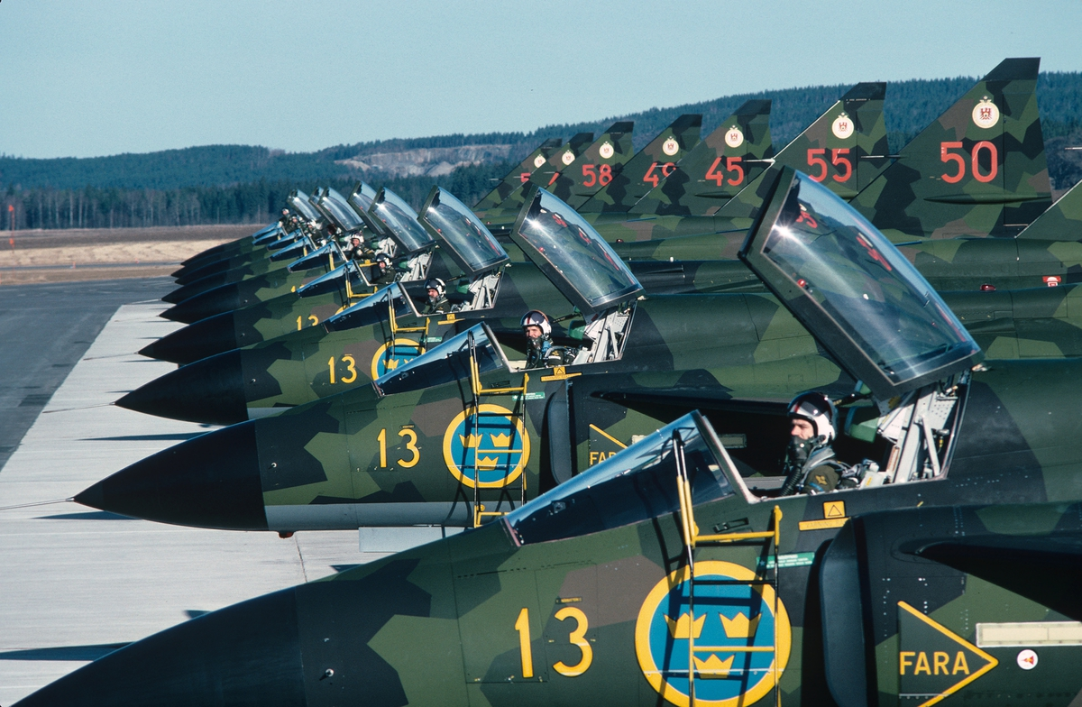 Flygare ur 2:a jaktdivisionen F 13 Bråvalla sittandes i uppställda Saab JA 37 Viggen.